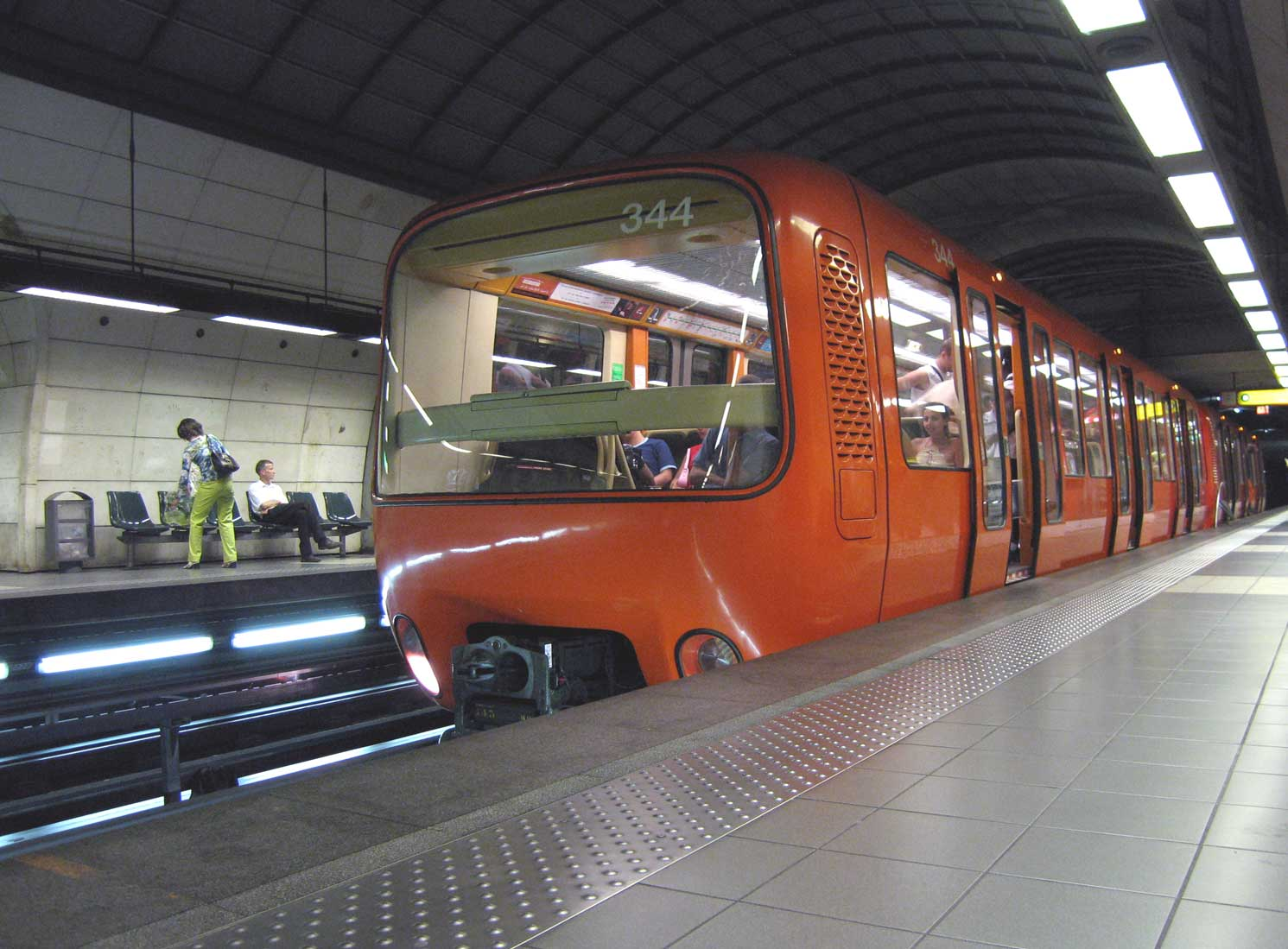 Rame de la ligne D , on peut remarquer l'absence de cabine conducteur, Lyon, France